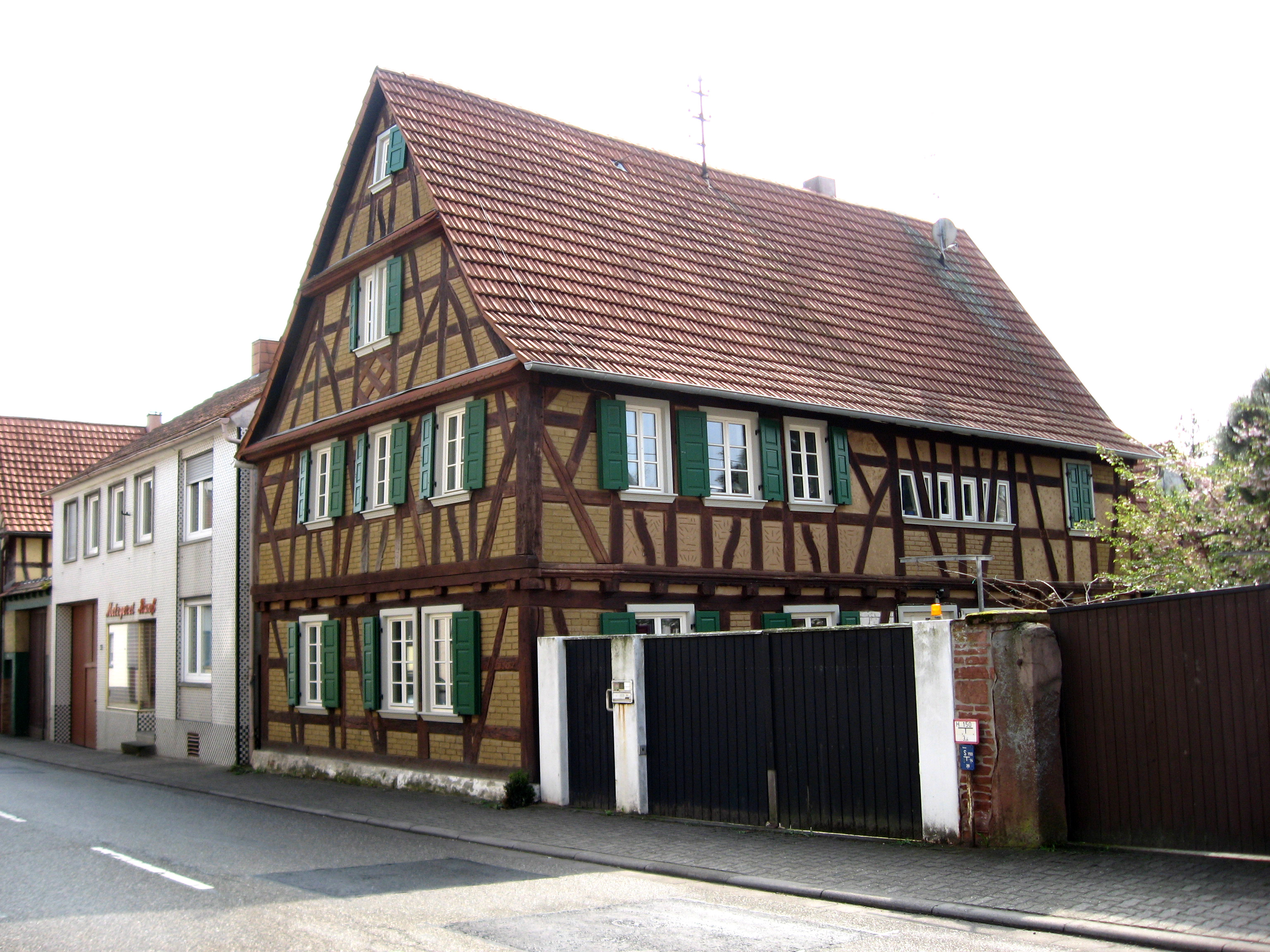 Fachwerkhaus Hauptstraße 55 in Minfeld